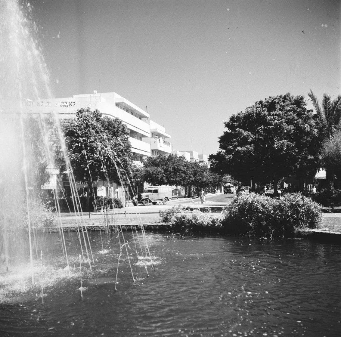 אוסף צילומים של הצלם זולטן קלוגר טווח מספרי התשלילים 28640 - 28709